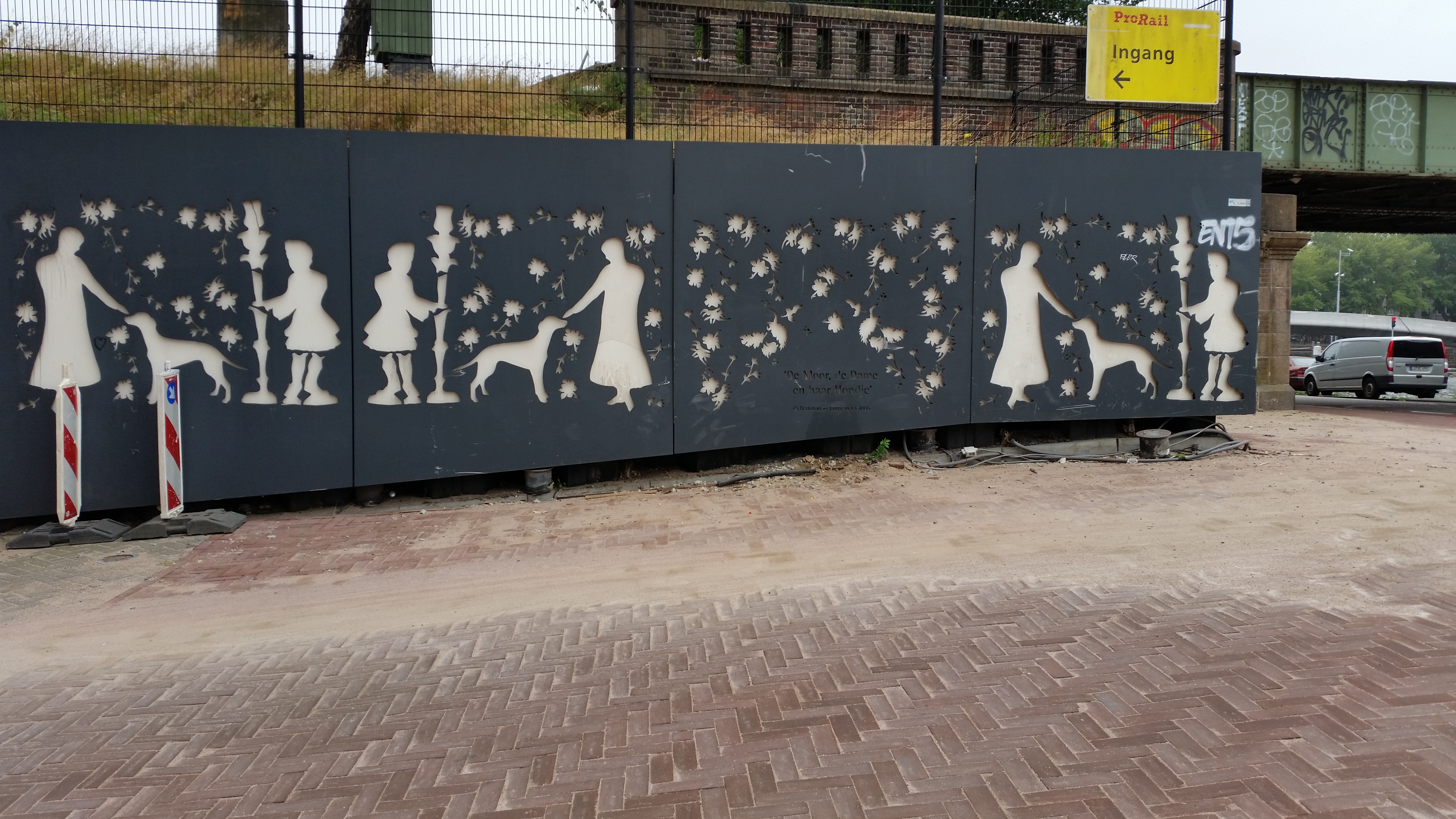 De moor, de dame en haar hondje, aantal panelen, rechts het oude spoorviaduct